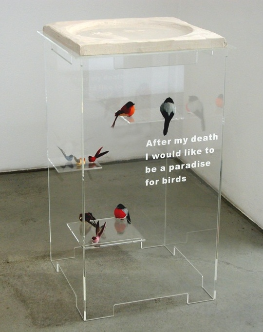 "After My Death" von Martin Gostner, 2003